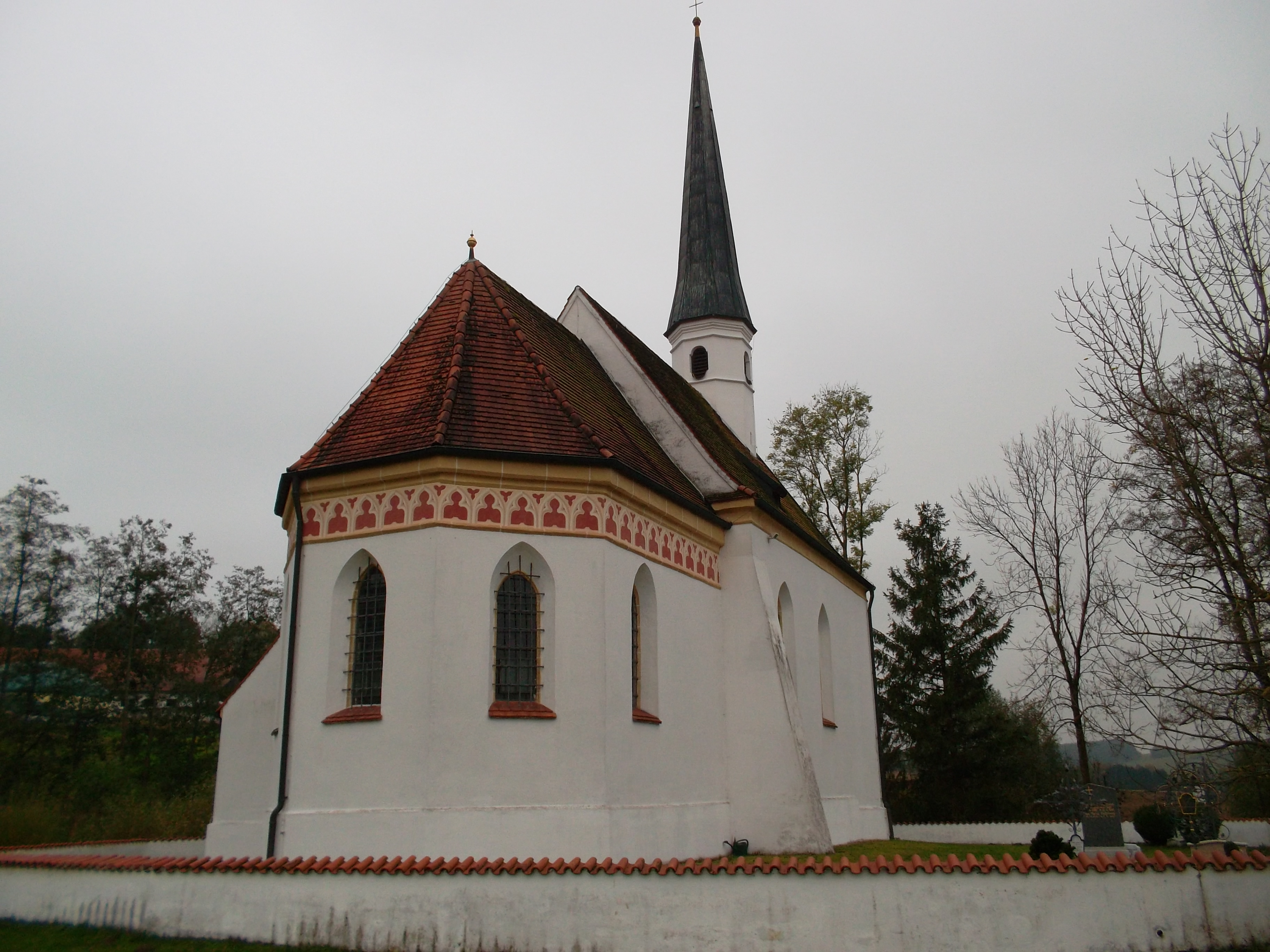 Lindumer Kircherl